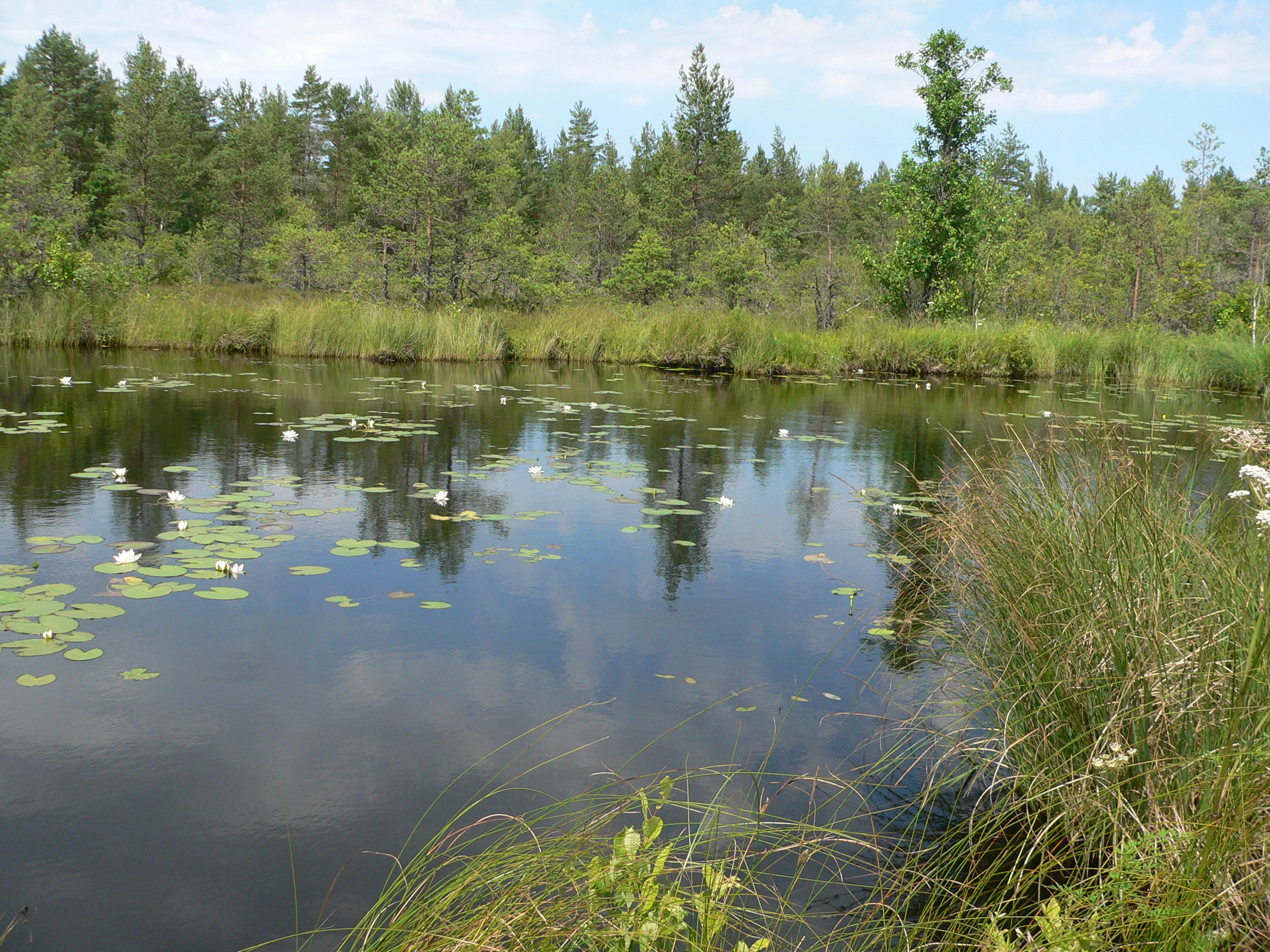 Slīteres nacionālais parks